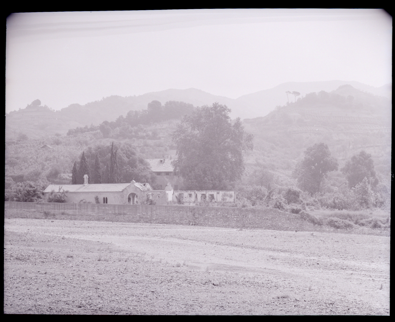 Val Polcevera. Serra Riccò (Genova). Villa Negrotto Cambiaso, in abbandono, nella località Mainetto. Cappella e viale sul retro della villa. Veduta generale dall'altra parte del torrente Secca. Servizio fotografico : Genova, 1964 / Paolo Monti. - Buste: 2, Fototipi: 2 : Negativo b/n, gelatina bromuro d'argento/ pellicola ; 10x12. - ((Serie costituita da 2 buste sciolte di negativi identificati con i nn.: 8374, 8374bis. - Su agenda denominata "Monti/ 2/ 6 giugno 1964 - 31 marzo 1966/ 8194-12420" in corrispondenza dell'indicazione della suddetta serie appunto manoscritto: "Genova. Villa lungo il Polcevera fotografata dall'altra parte del fiume". - Il negativo identificato con il numero 46397 è stato realizzato per Zodiac. - Occasione: Documentazione per la pubblicazione: Italia Nostra (a cura di), "Le ville genovesi", catalogo della mostra, Genova 1962, Genova, Comune di Genova, 1967. - Fonte: Monografia di Italia Nostra (a cura di): Le ville genovesi, catalogo della mostra, Genova 1962, Genova, Comune di Genova (1967). - Fonte: Lettera di Paolo Monti: I. Carteggi/ Genova - Enrico (1963-1966), presso Archivio Paolo Monti. Camicia con documenti dattiloscritti e manoscritti vari relativi al lavoro eseguito per Italia Nostra: preventivi, lettere, inventari. - Fonte: Agenda di Paolo Monti: Monti/ 2/ 6 giugno 1964 - 31 marzo 1966/ 8194-12420 (1964-1966), presso Archivio Paolo Monti